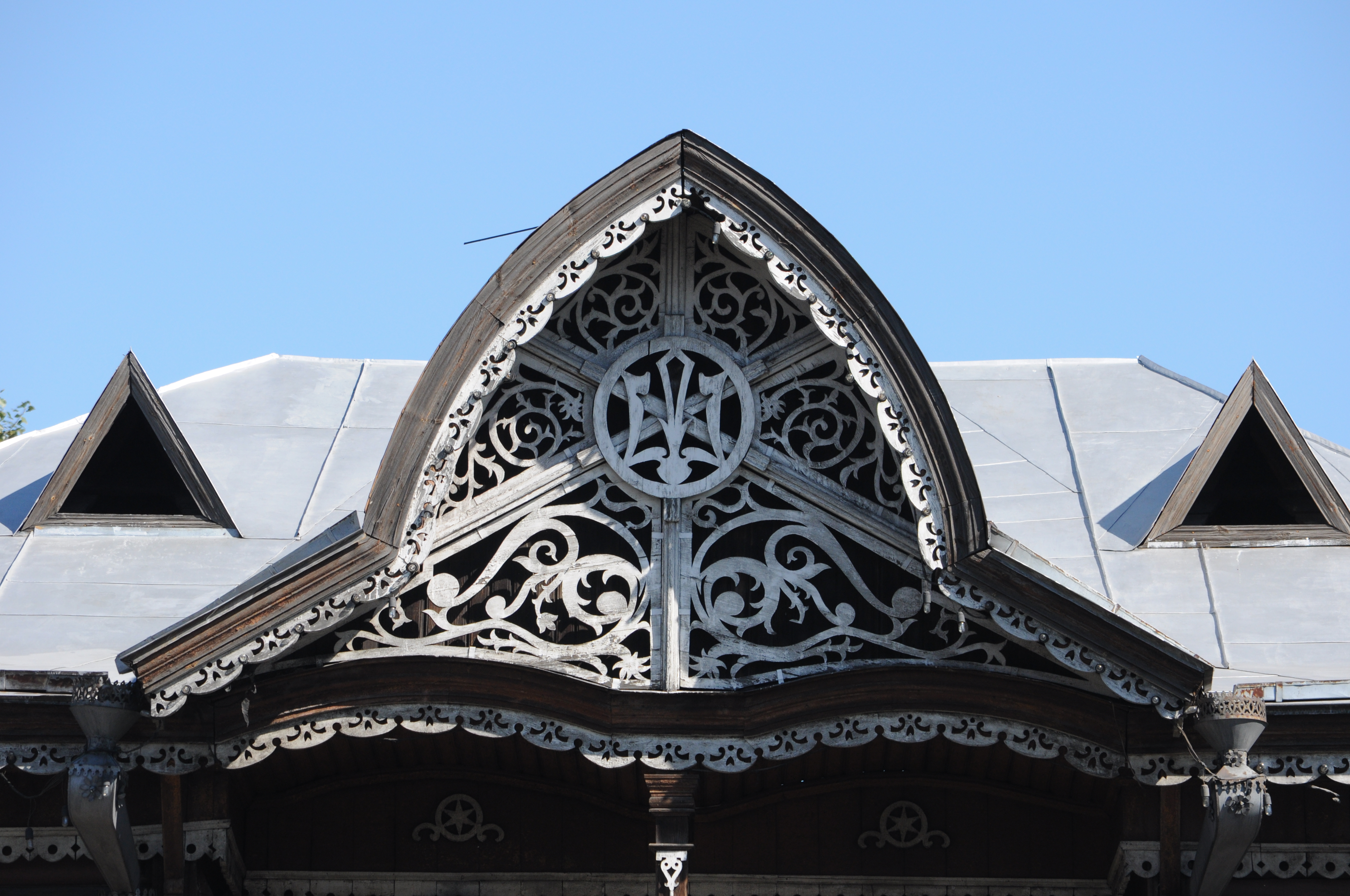 Дом купца Шадрина в Барнауле, вид от Красноармейского проспекта